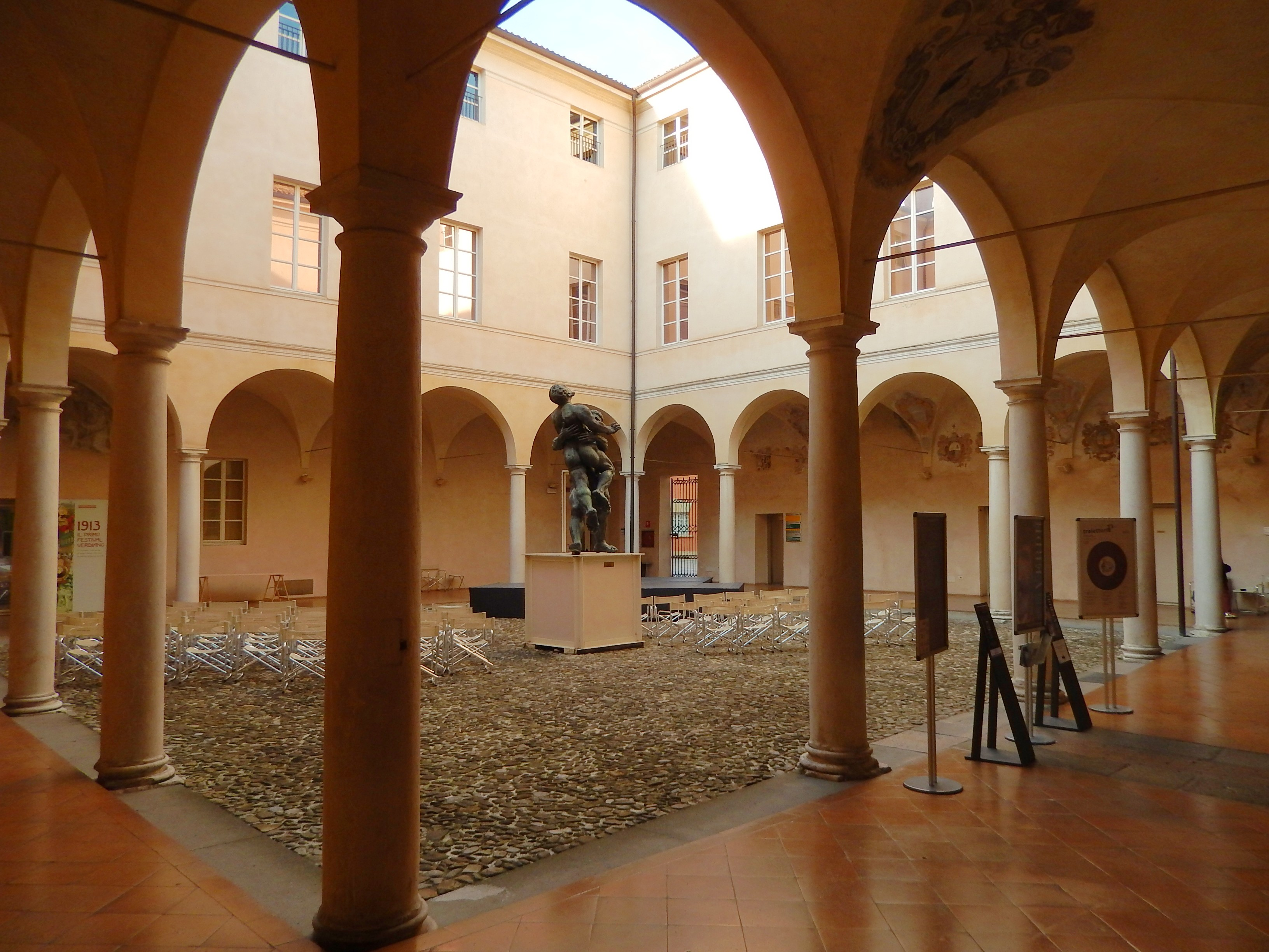 Palazzo Cusani - Casa della Musica, Parma This is a photo of a monument which is part of cultural heritage of Italy.